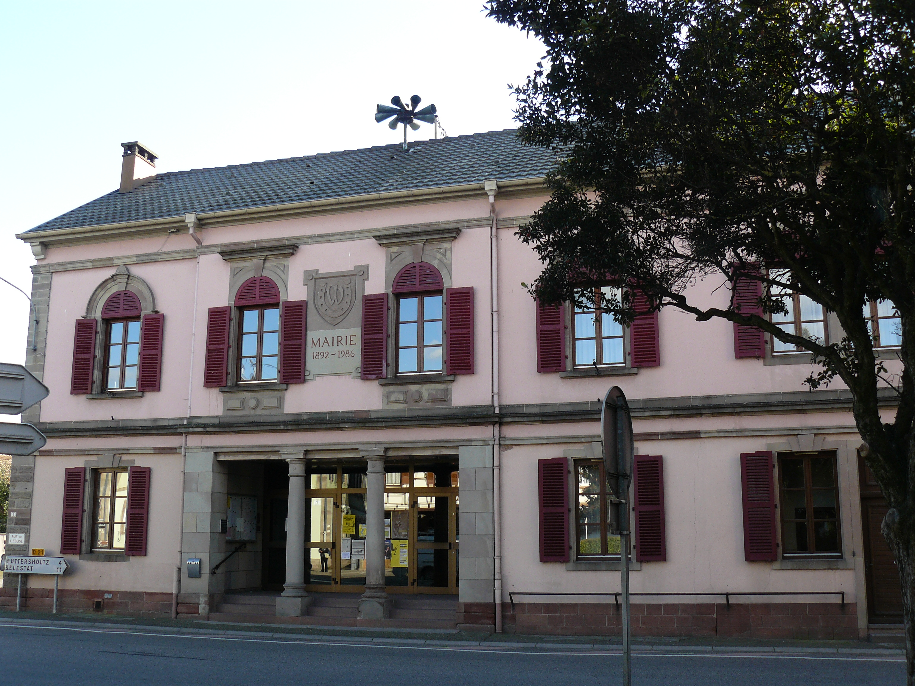 Mairie de Wittisheim